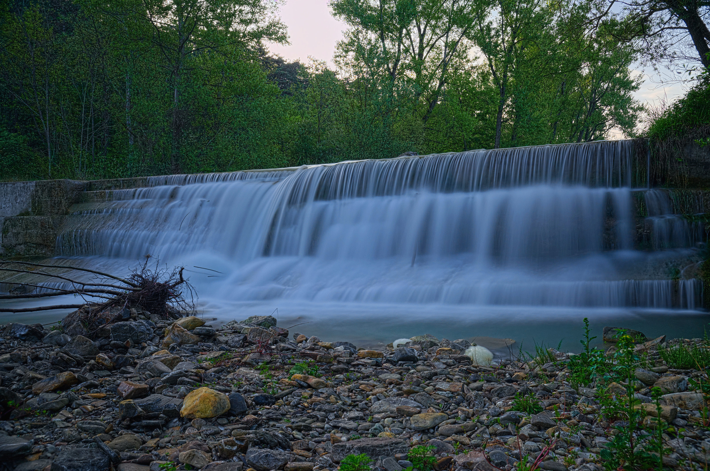 Briglia sul Tidone